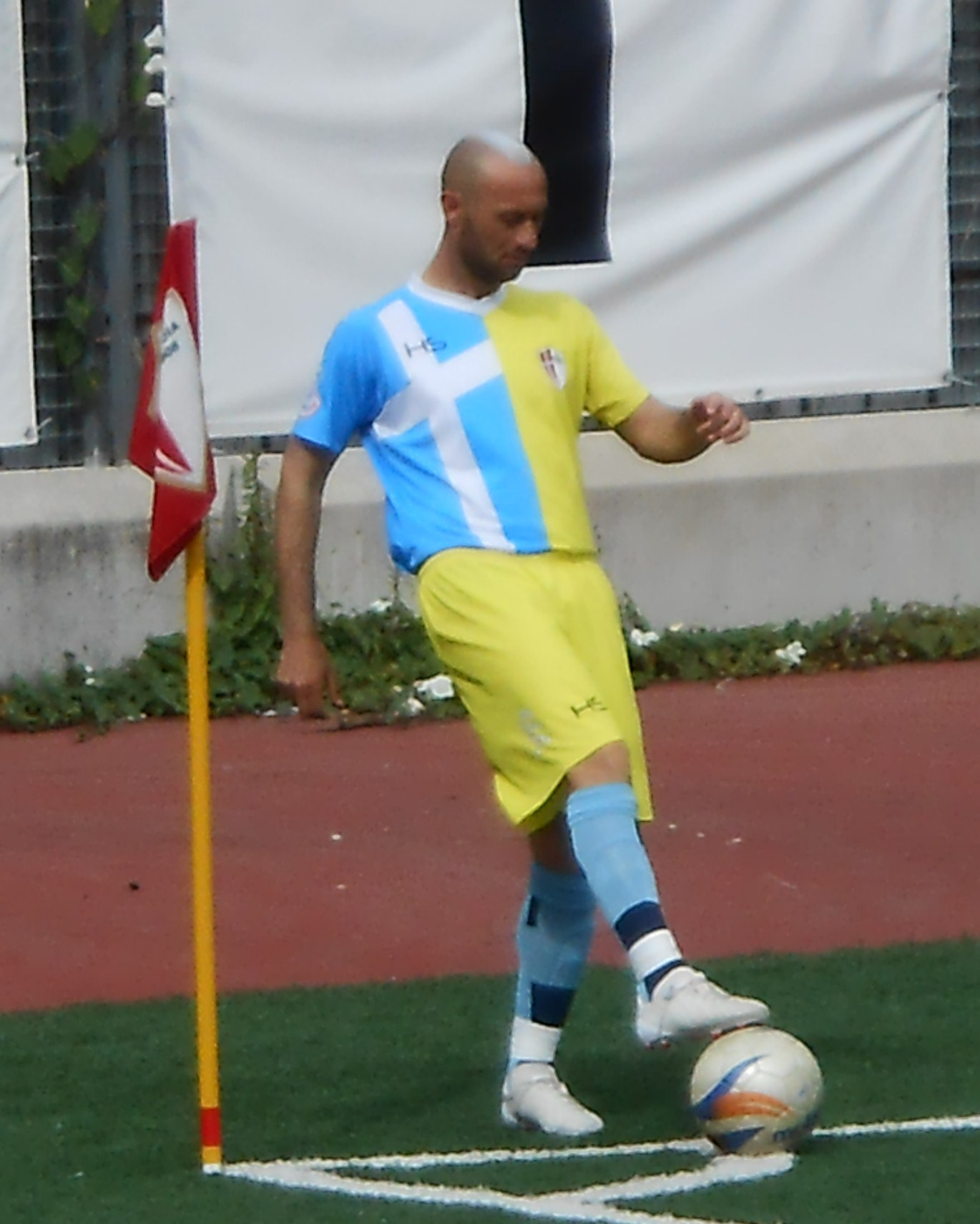 Pasquale Carotenuto durante il match Savoia - Città di Messina.jpg